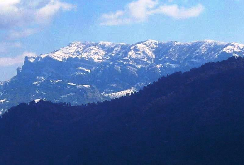 Las Banderillas nevadas, desde el puerto de las Palomas.